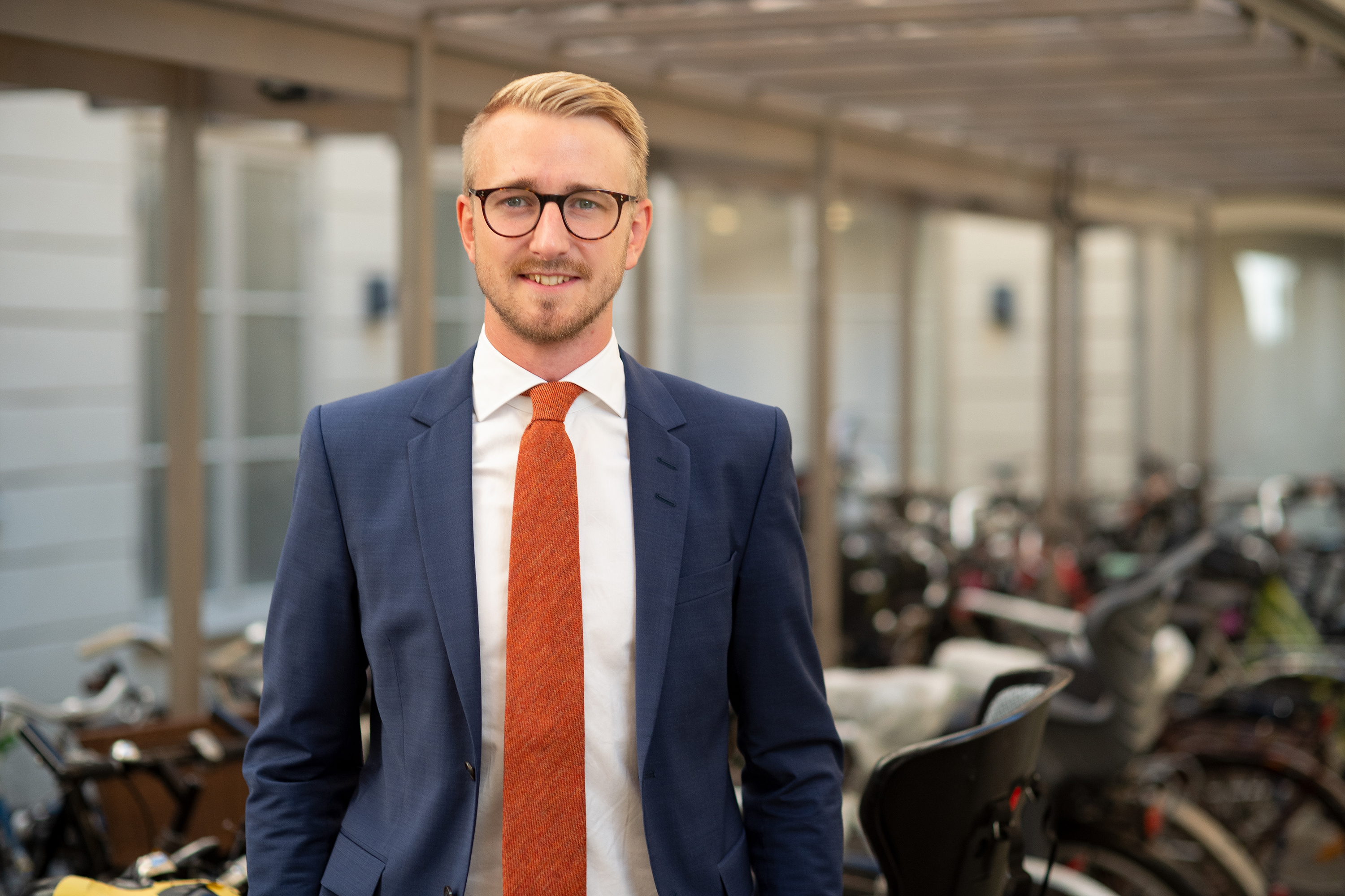 Fredrik Christensson, Centerpartiet Fredrik Christensson, Riksdagsledamot för Centerpartiet.